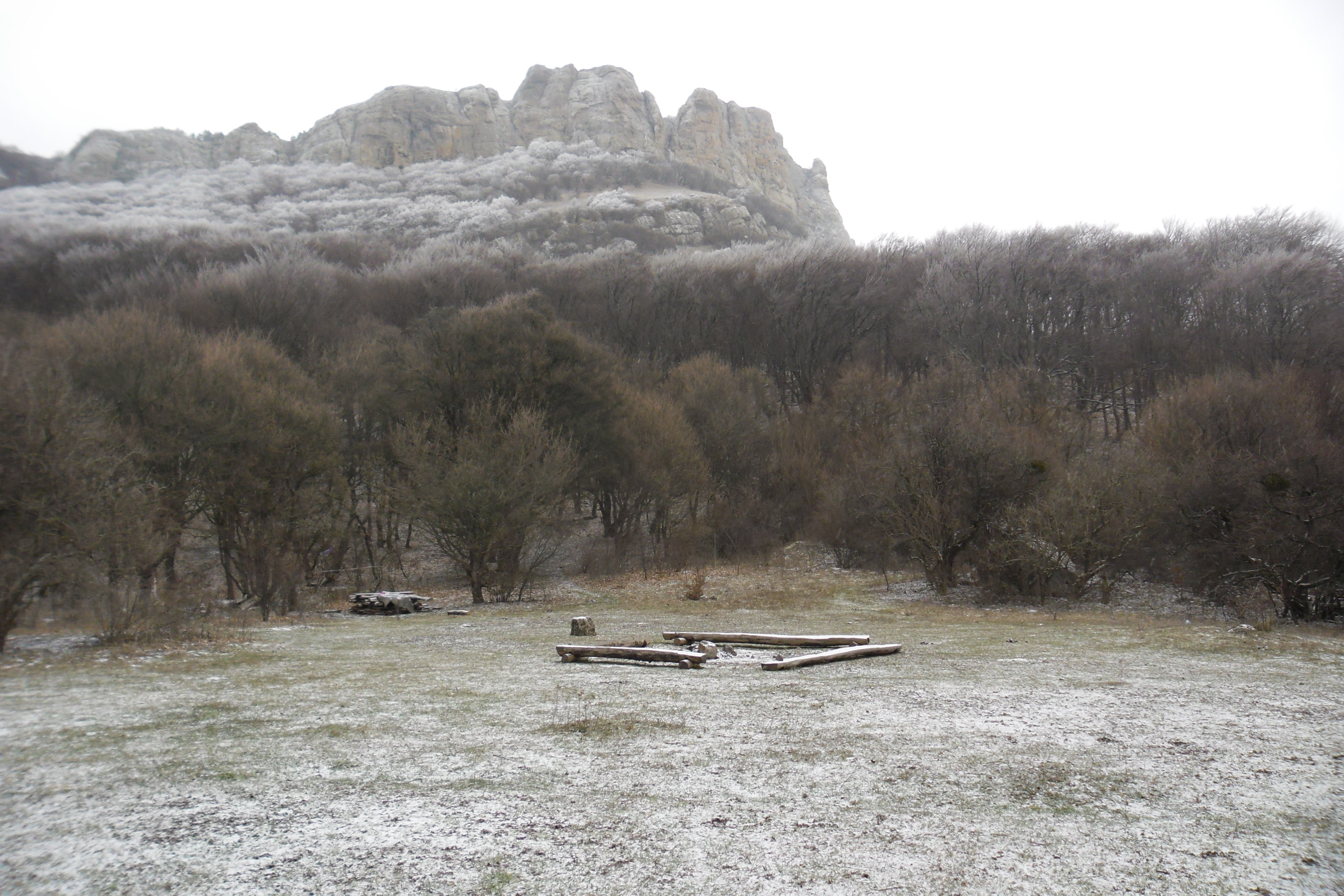 Фото